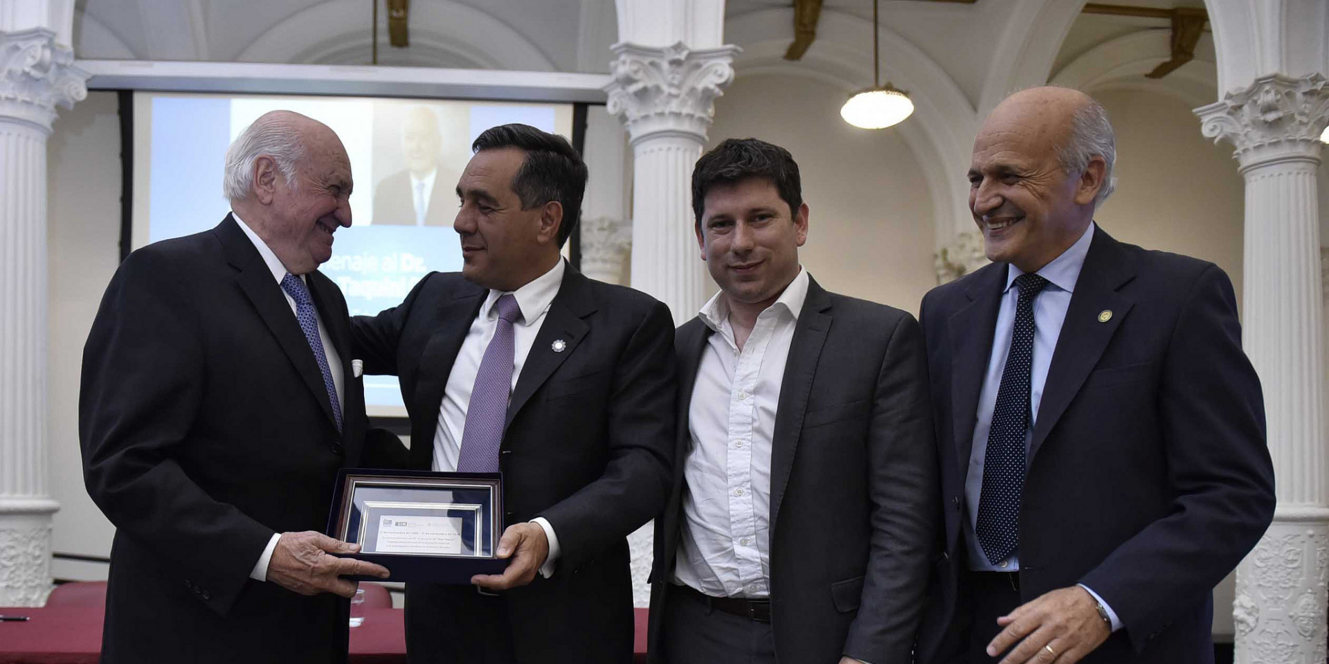 El día 13 de diciembre de 2018, el Ministerio de Educación, Cultura, Ciencia y Tecnología de la Nación realizó un reconocimiento al Doctor Alberto Taquini (h) al cumplirse cincuenta años del “Plan de Creación de Nuevas Universidades”, un proyecto de su autoría que permitió la creación de 14 universidades entre 1971 y 1973.